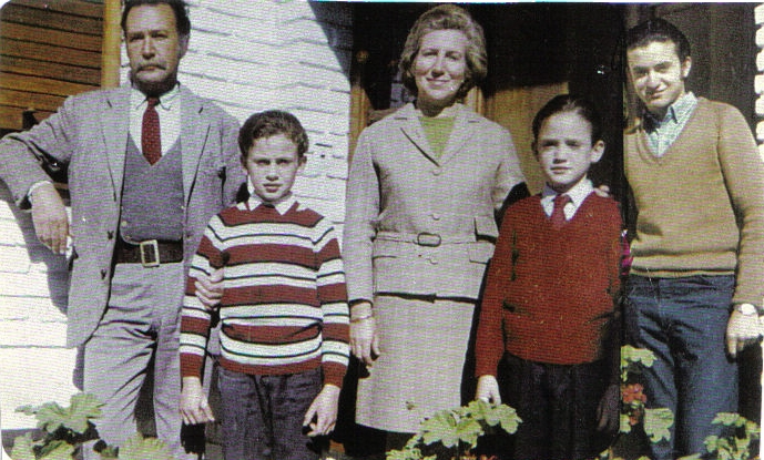 Izquierda a derecha: Huberto Cuevas Acevedo, Patricio Martin Cuevas, Susana Otamendi, Máximo Miguel Cuevas y Huberto Aníbal Cuevas